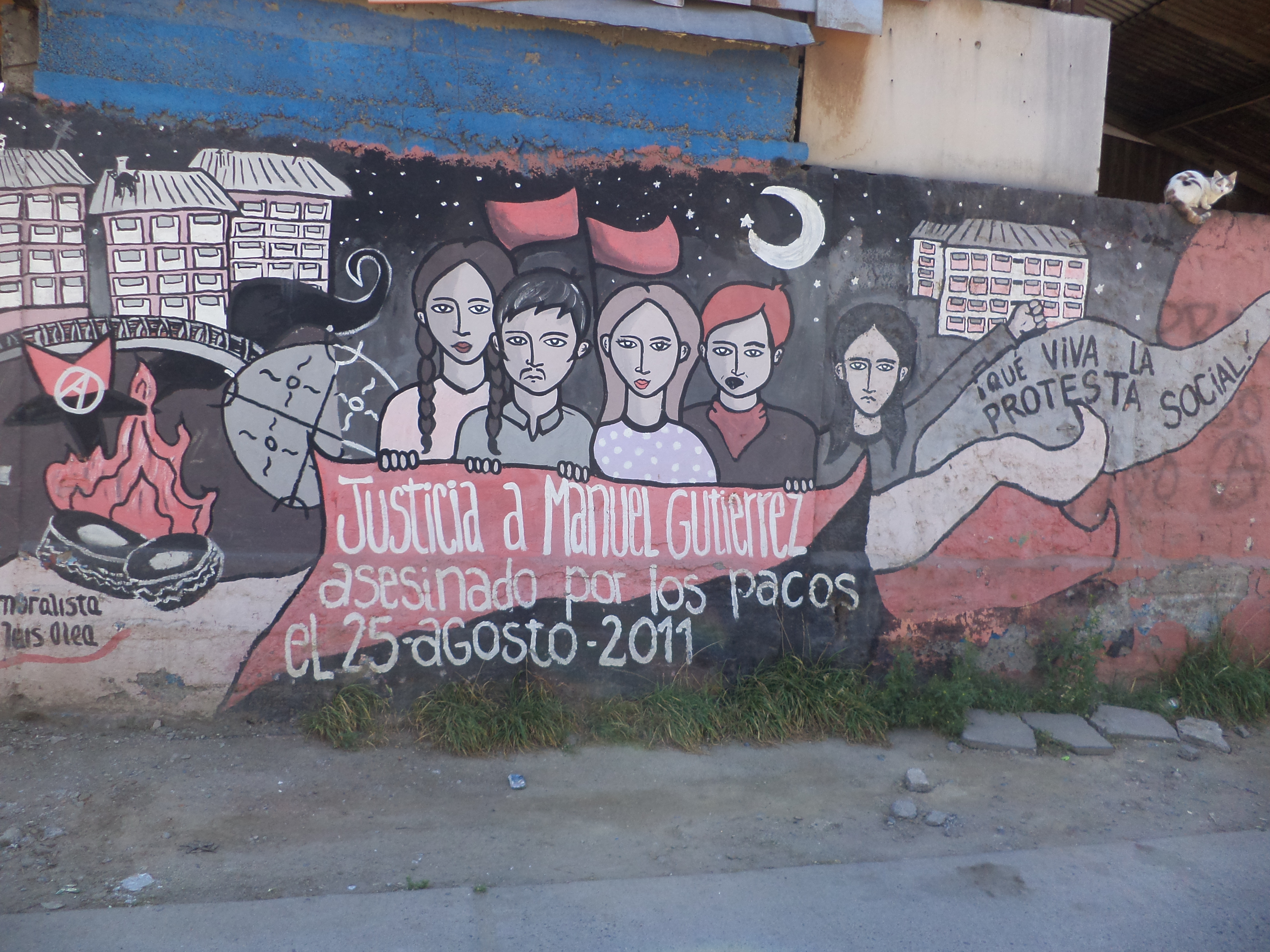 Pintada realizada en la población Jaime Eyzaguirre, Macul, por los grafiteros de la anarquista Muralista Luis Olea (MLO) en homenaje al joven estudiante Manuel Gutiérrez, de 14 años, que murió el 25 de agosto de 2011 a consecuencia de los disparos hechos por el entonces sargento de Carabineros durante unas manifestaciones convocadas por la CUT bajo la pasarela que conecta Macul y Peñalolén.